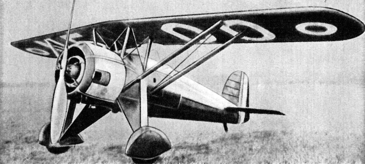 Francuski samolot myśliwski Morane-Saulnier M.S.225.